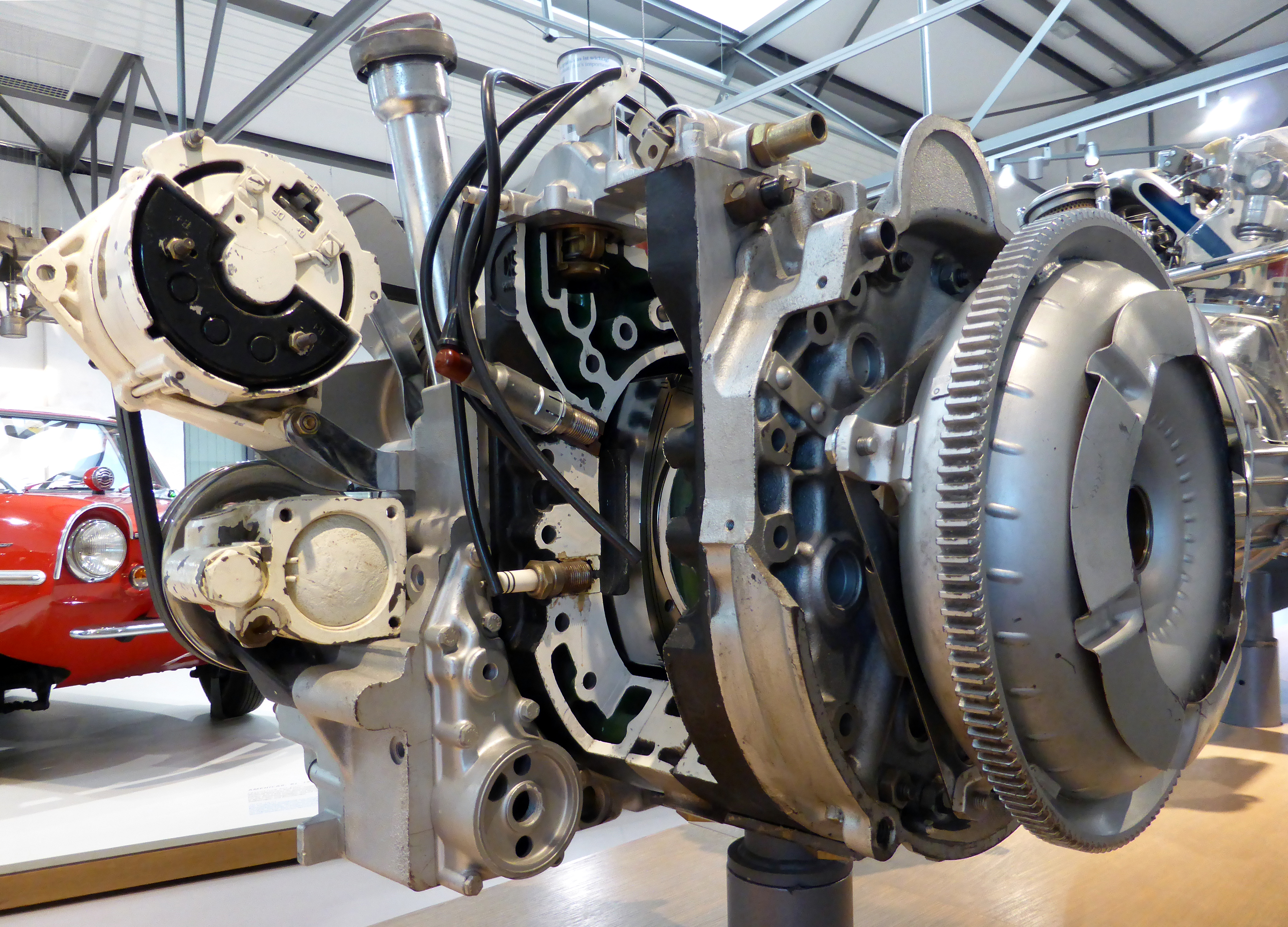 Wankelmotor eines NSU Ro 80, Baujahr 1970 (Rotationskolbenmotor). Ausgestellt im Deutschen Technikmuseum Berlin. Wikipedianische KulTour am 10. Oktober 2015 in der Ausstellung des Museums.